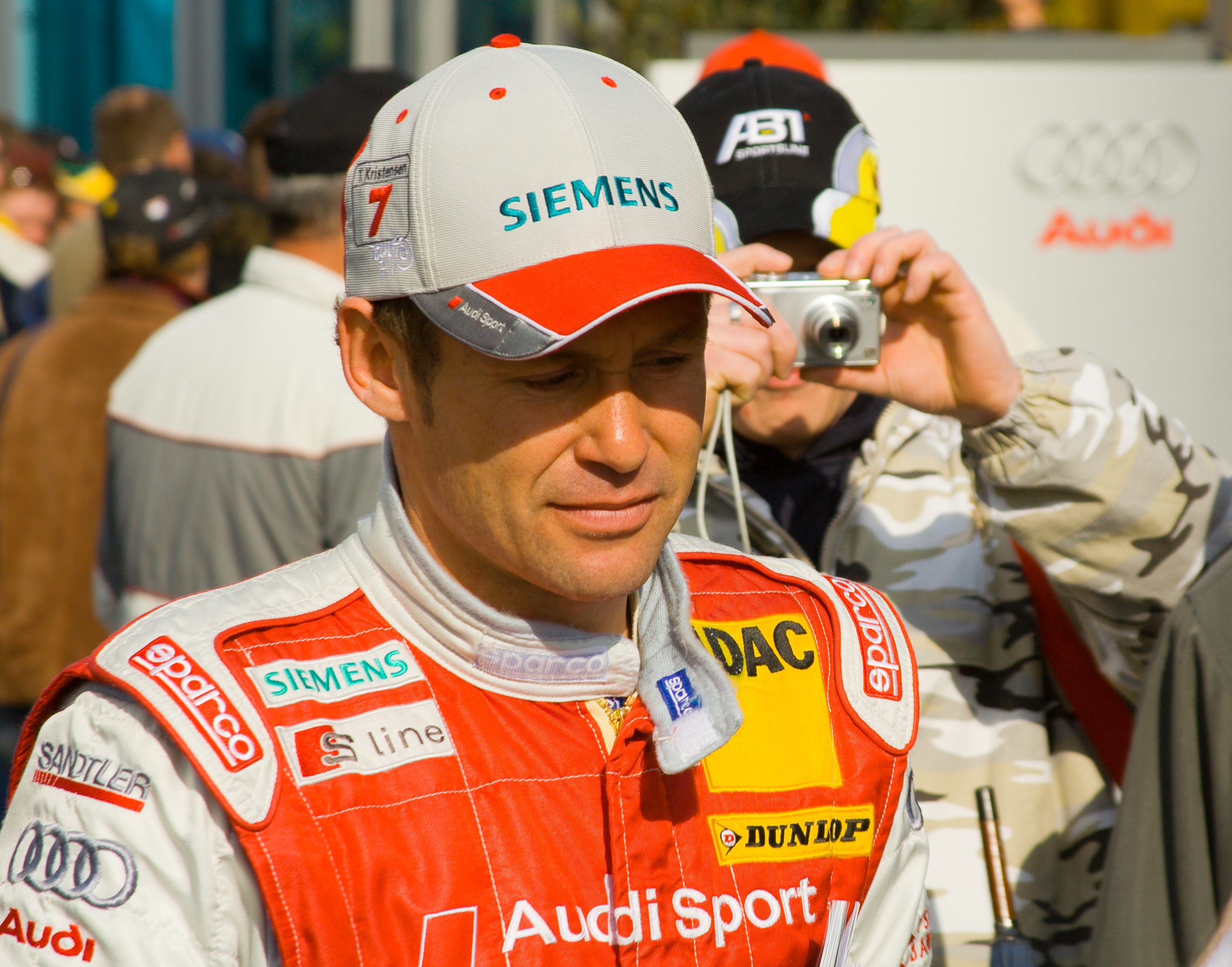 DTM Tom Kristensen